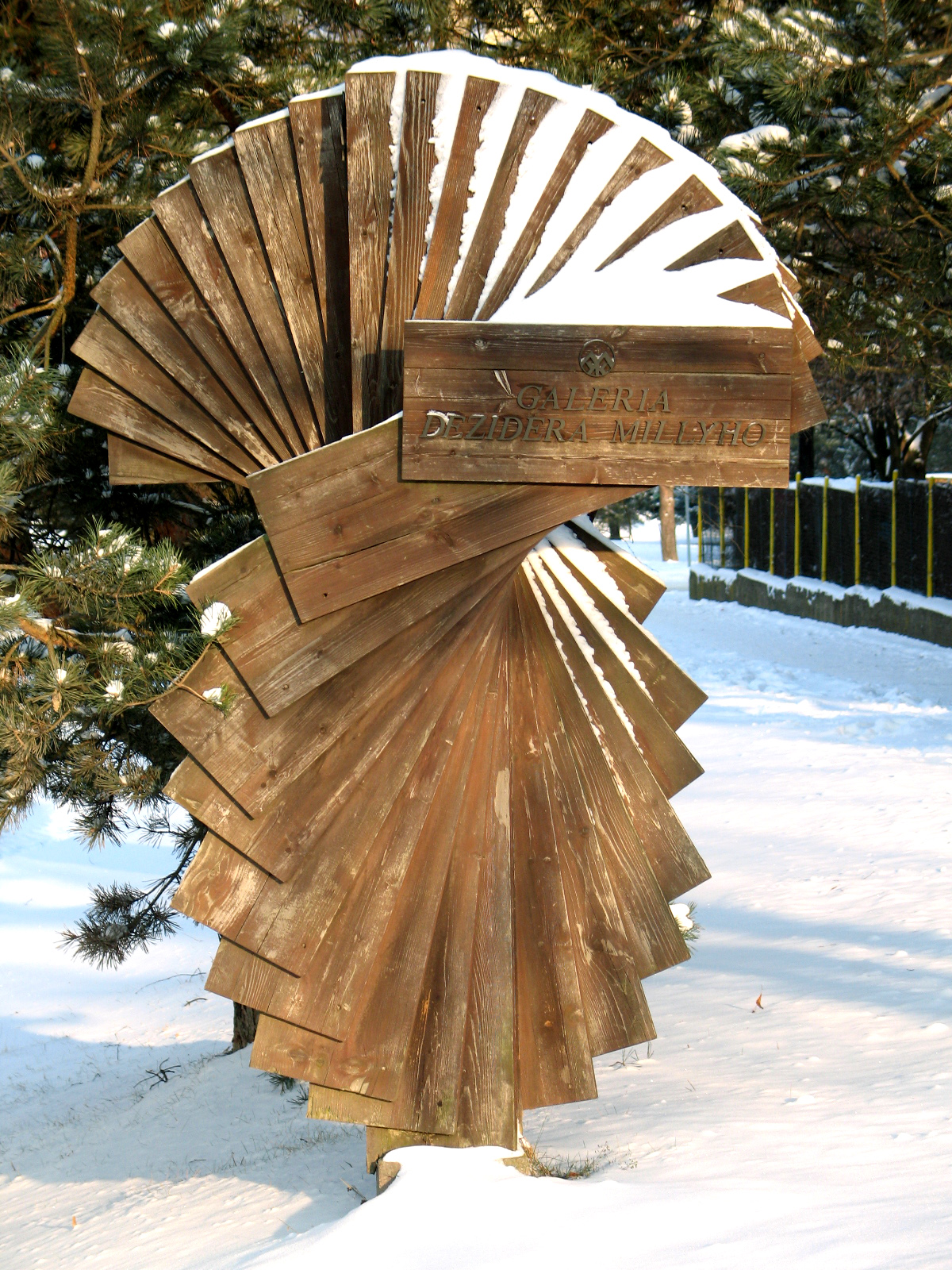 Informačný vejár pri miestnej komunikácii uputáva pozornosť na galériu Dezidera Millyho